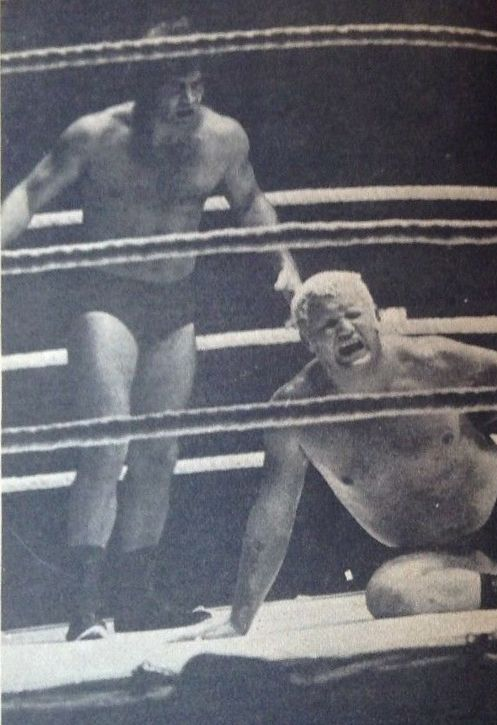 Jack Brisco dans l'almanach de catch Official Wrestling Yearbook n.3 de juin 1973.